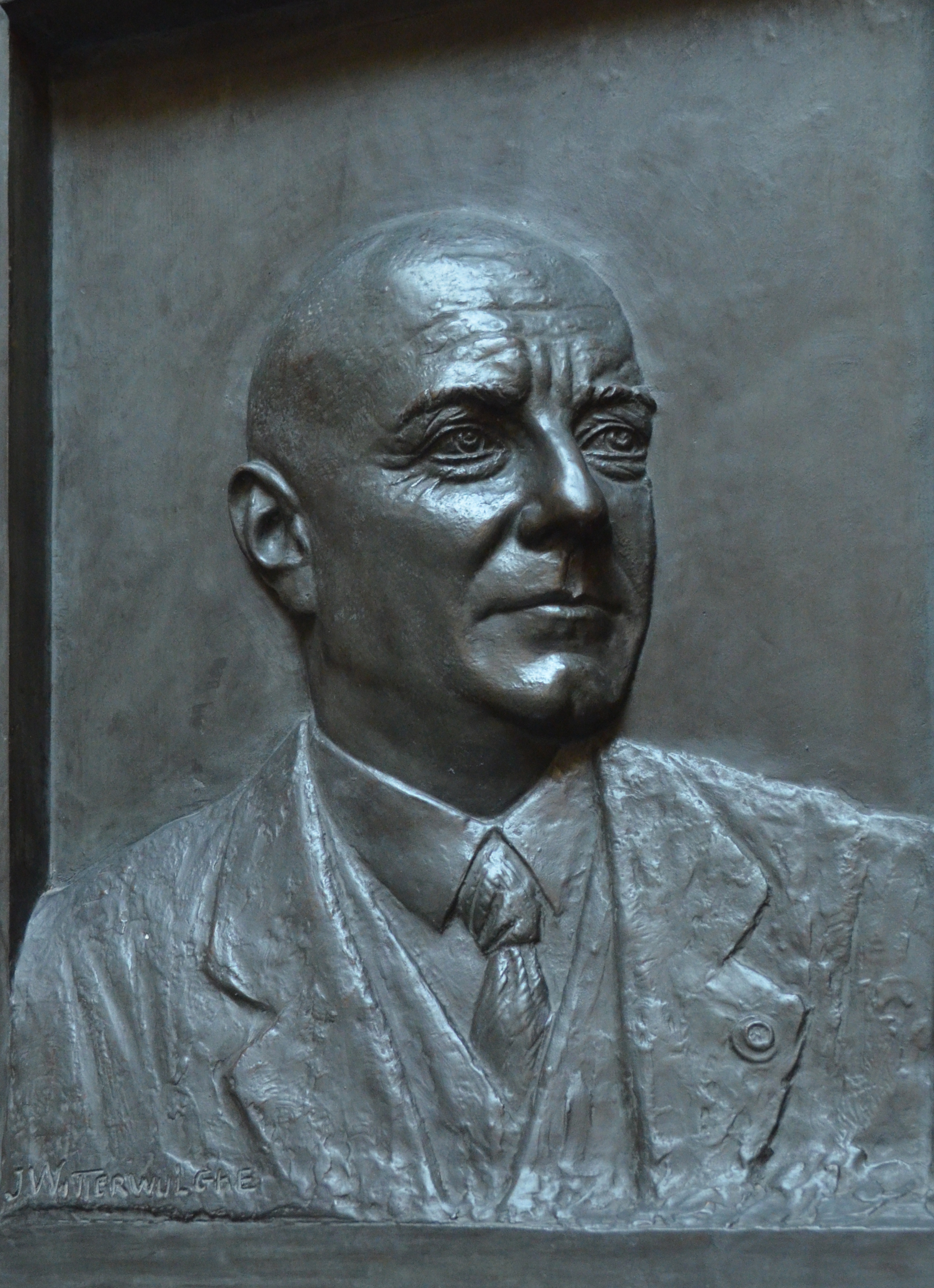 Charleroi (Belgique) - Jules Hiernaux - Atrium de la Bibliothèque de l'Université du Travail Paul Pastur. Œuvre de Joseph Witterwulghe (détail).